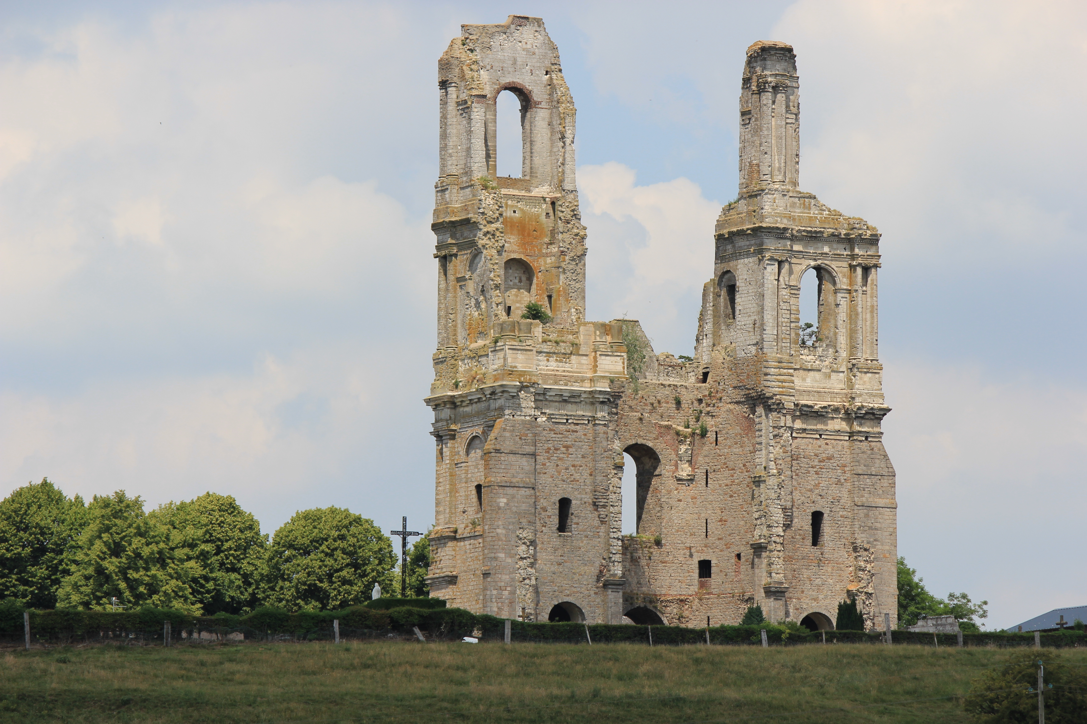 Abbaye du mont Saint-Éloi,près d'Arras